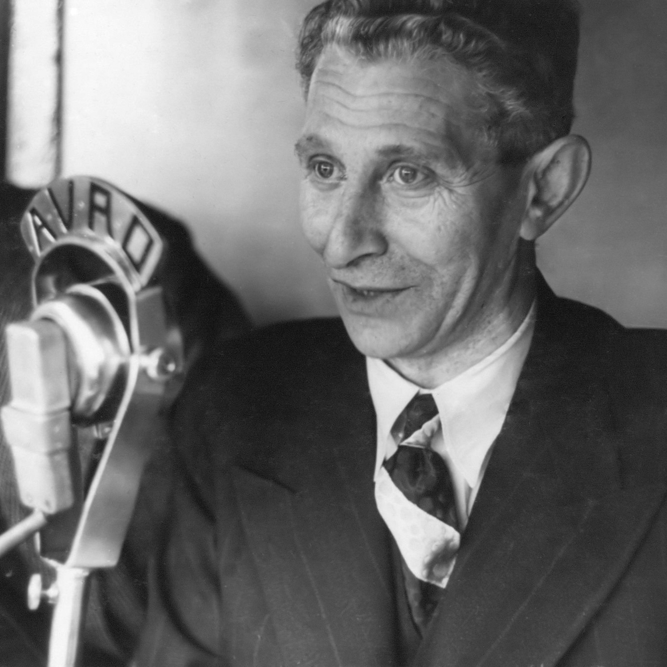 AVRO-radioverslaggever Han Hollander aan het werk. Nederland - Schotland (1-3), gespeeld op 21 mei 1938 in het Olympisch Stadion te Amsterdam. 21 mei 1938